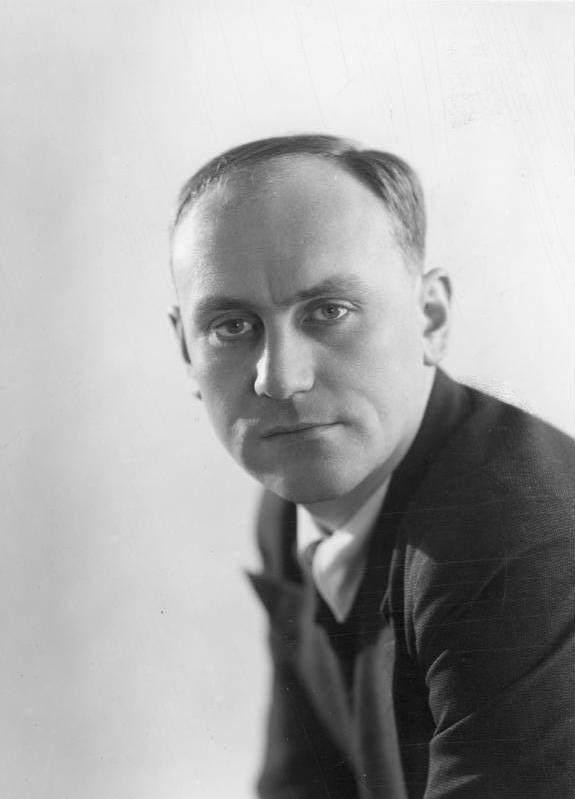 Bernhard Minetti Schauspieler Hs 12373-34